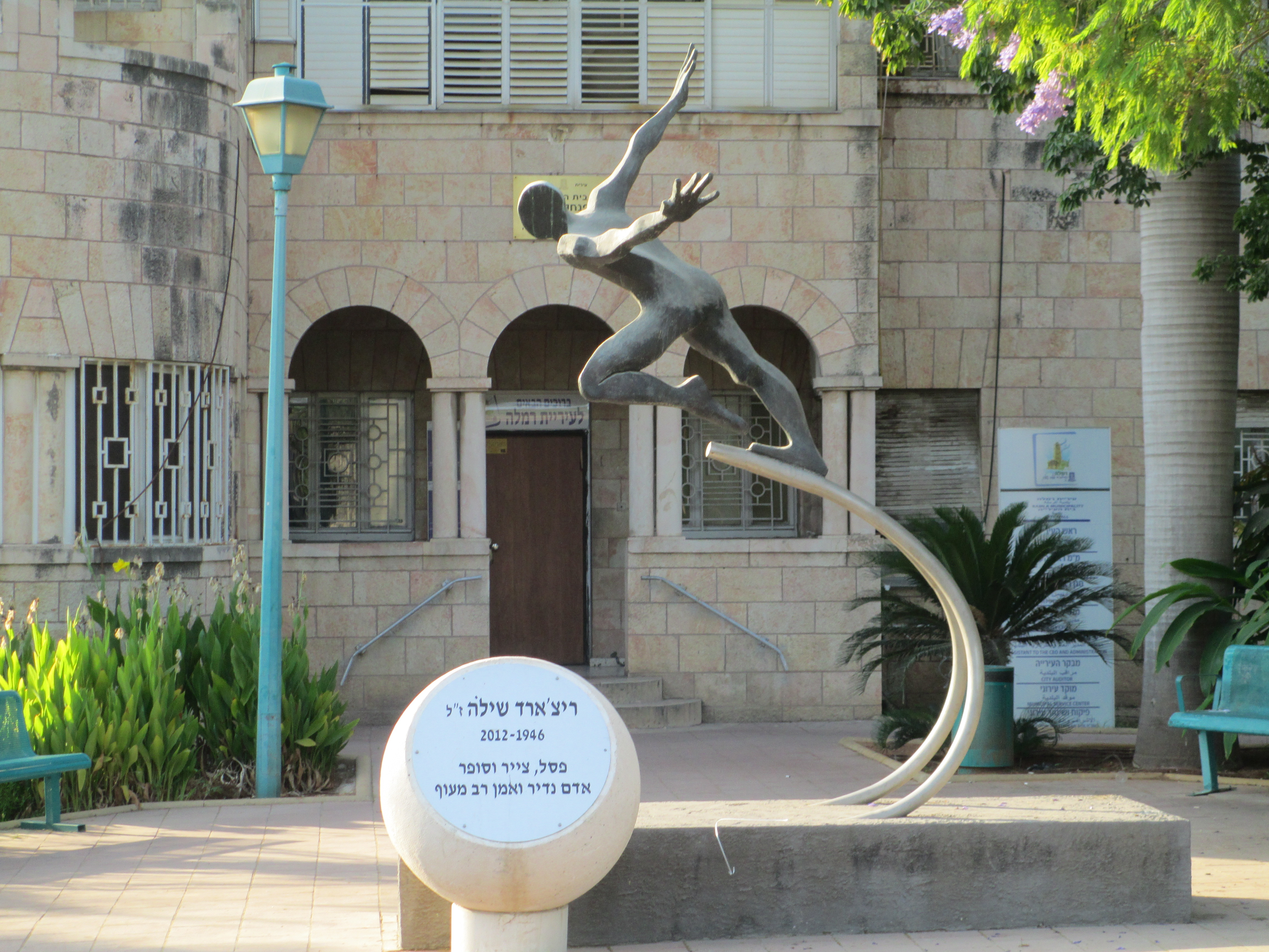 הפסל מעוף של ריצ'ארד שילה בחזית בניין עיריית רמלה